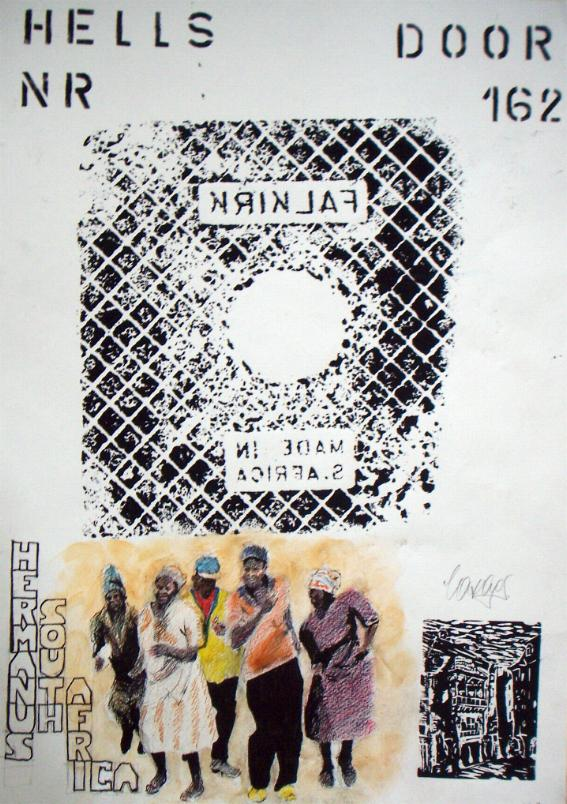 Druck